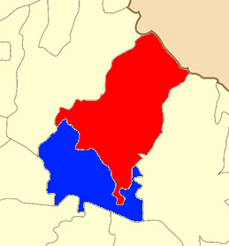 Χάρτης των ενοτήτων του Δήμου Εμμανουήλ Παπά.